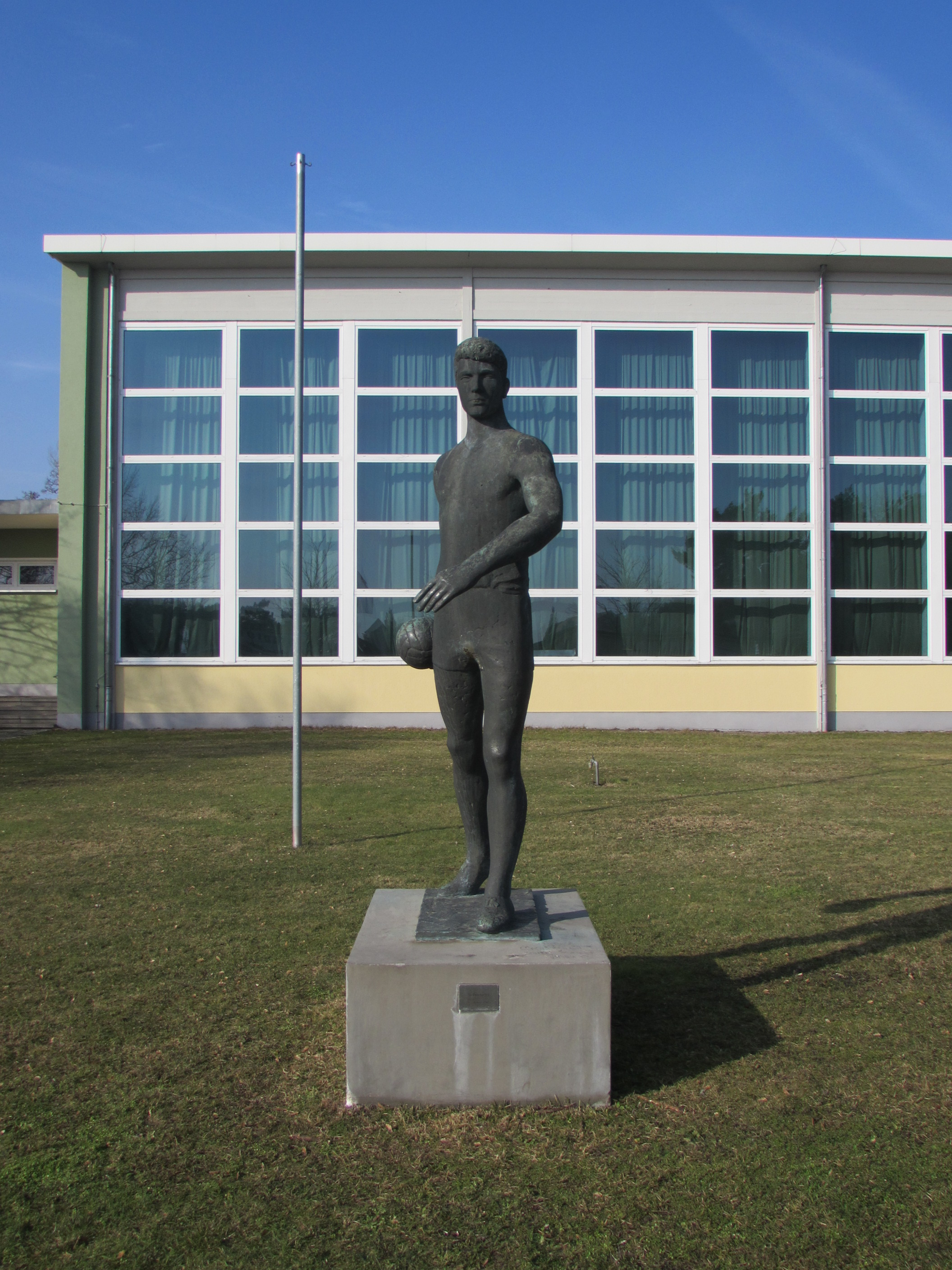 siebenmeter, bronzeskulptur von karl mertens 1963